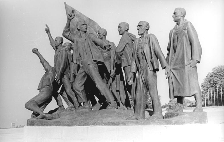 Gedenkstätte Buchenwald, Mahnmal Zentralbild Böhm 9.10.1958 Die Buchenwaldgruppe von Professor Cremer UBz: Blick auf die Buchenwaldgruppe, geschaffen von Nationalpreisträger Professor Fritz Cremer. Diese Bronzeplastik steht vor dem Glockenturm der Mahn- und Gedenkstätte Buchenwald auf dem Ettersberg bei Weimar.